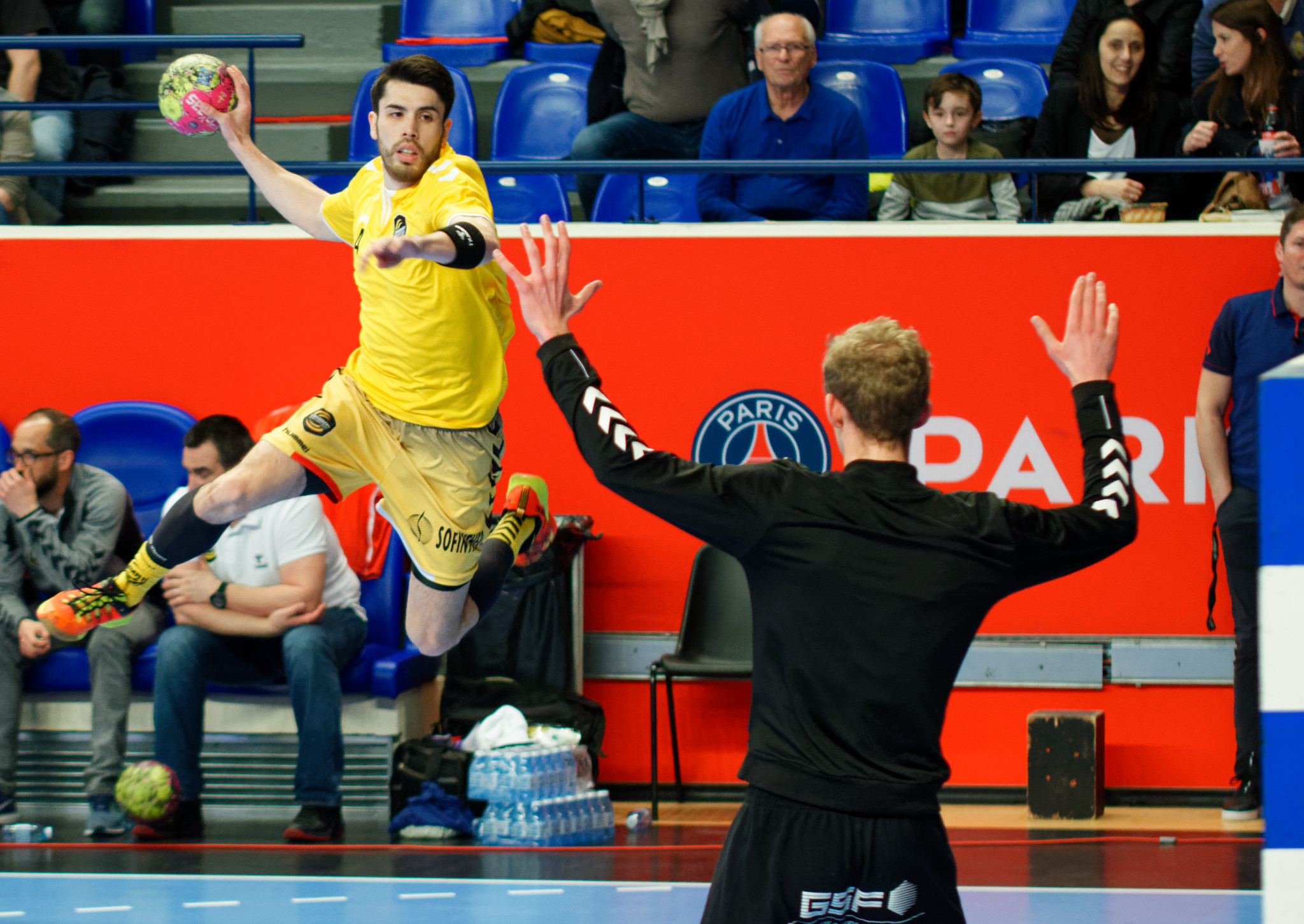 Rencontre de championnat de LidlStarLigue entre le PSG et chambéry. A coubertin, le 15 mars 2017.